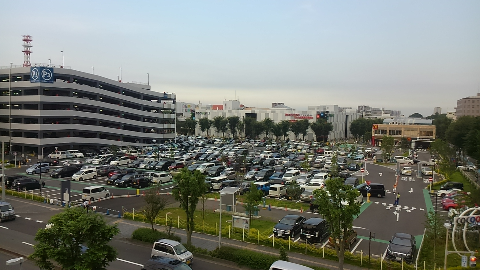 さいたま新都心の「コクーンシティ」遠景（大宮ほこすぎ橋から2015年7月20日撮影）。埼玉県さいたま市大宮区吉敷町。